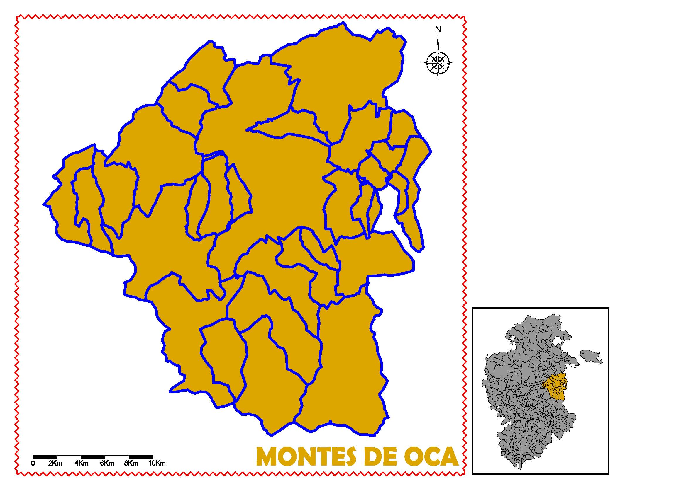 Ubicación de la comarca "Montes de Oca" en la provincia de Burgos